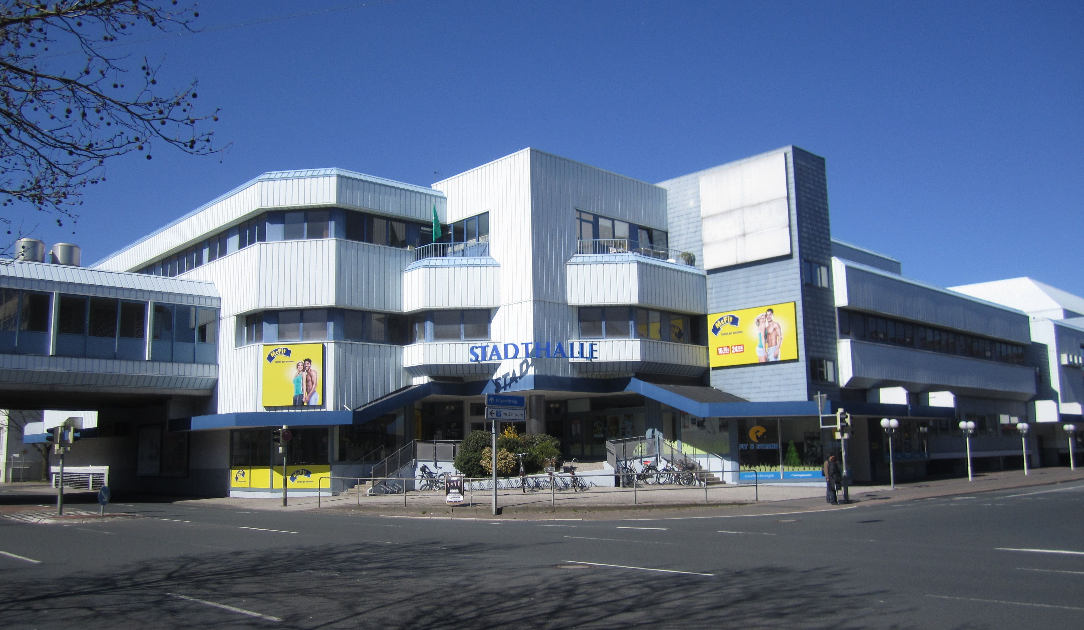 Stadthalle in Wilhelmshaven. Nach links die Peterstraße, rechts die Grenzstraße.